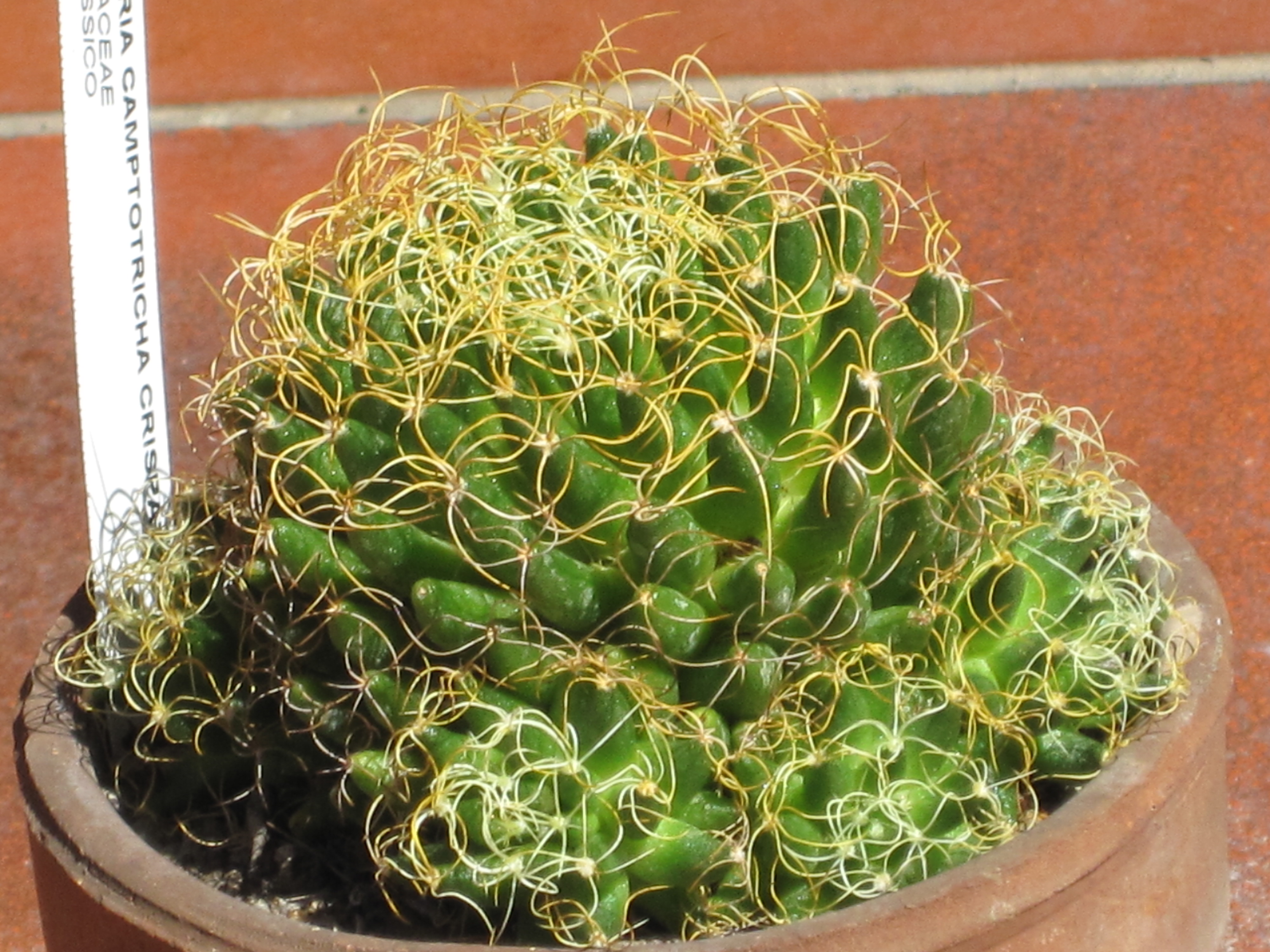 Esemplare di mammillaria decipiens (camptotricha) var. crispata